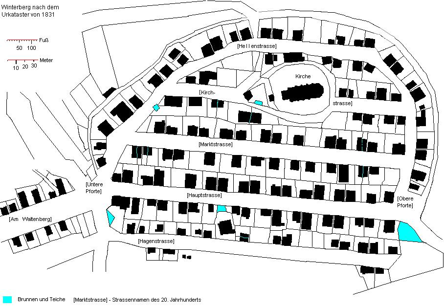 Winterberg nach dem Kataster von 1831